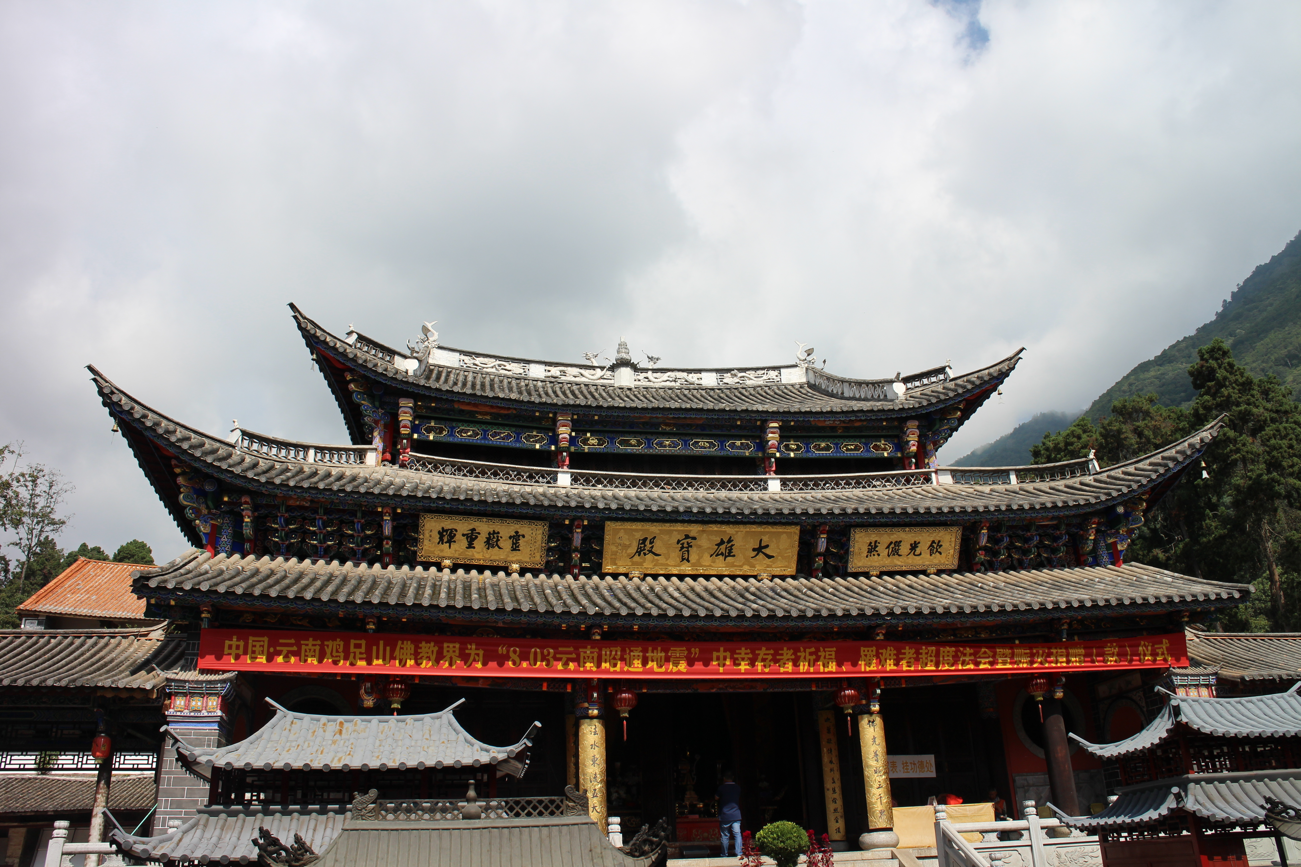 祝圣寺大殿